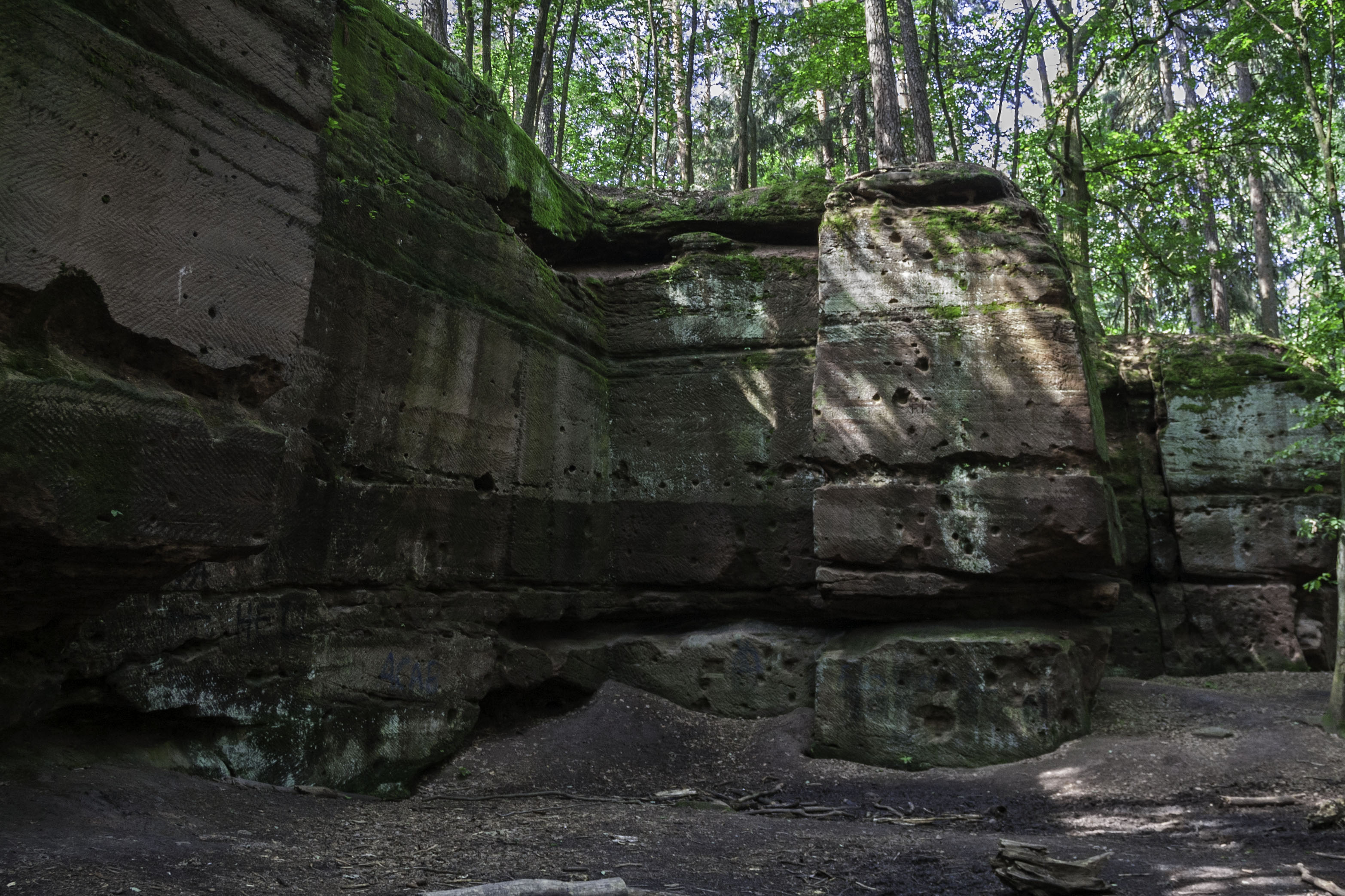 Schmausenbuck, Steinbrüche